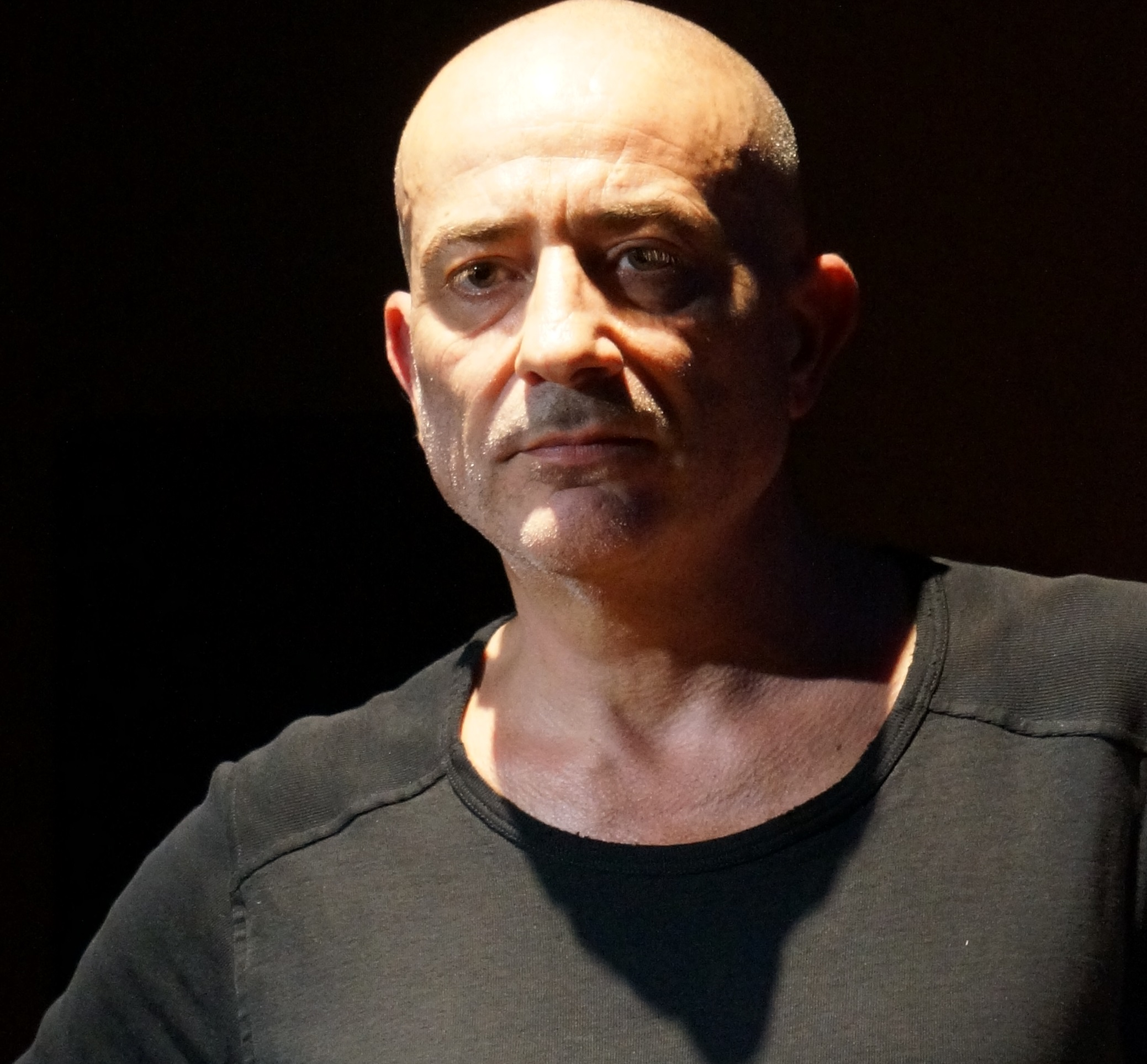 serge Teyssot-Gay joue "Nacarat" de Carol Robison à Césaré.